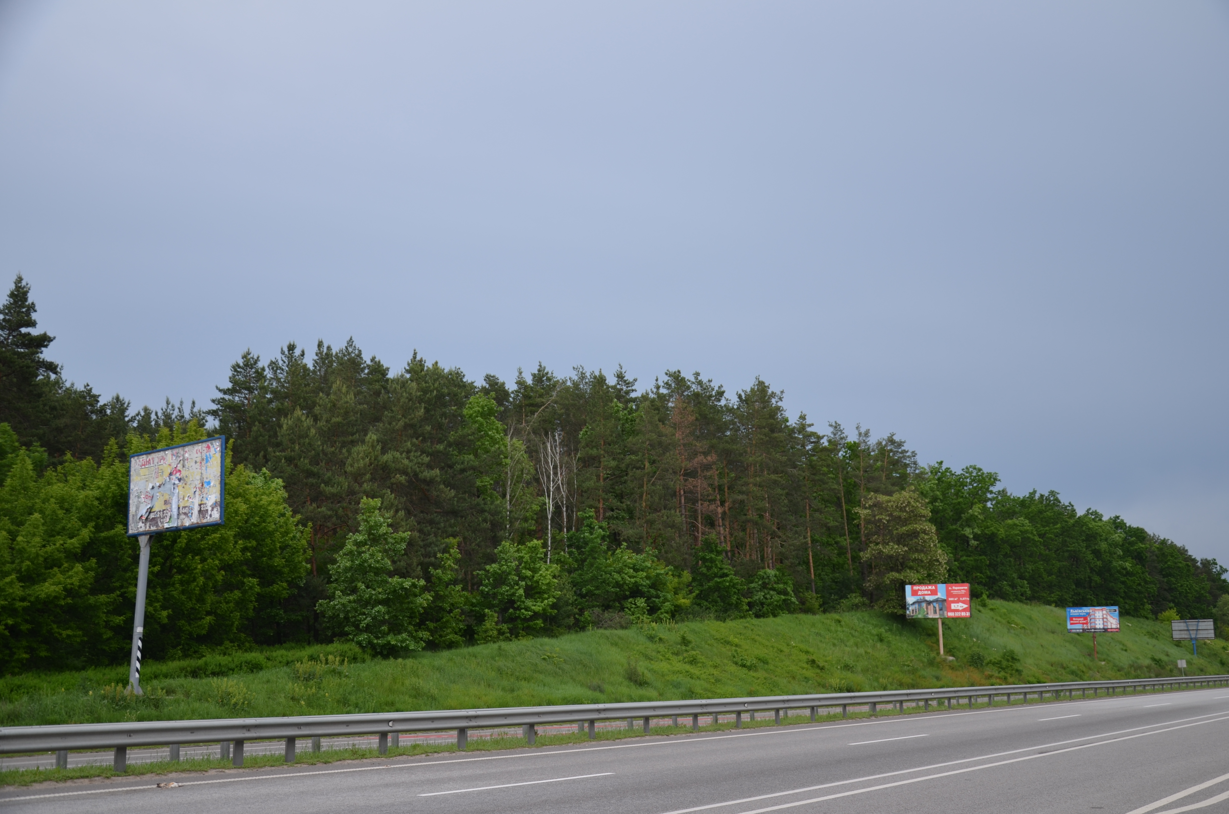 Гореницький, Києво-Святошинський район, Дмитрівська та Гореницька селищні ради